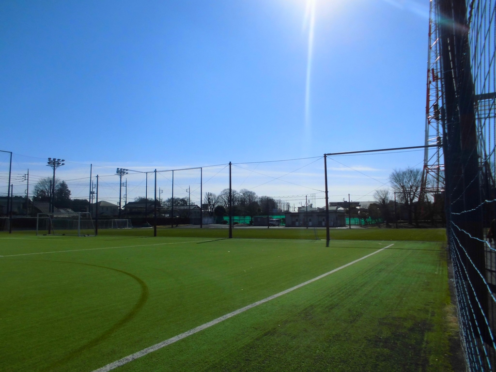 武蔵野苑、人工芝多目的グランドフィールド内